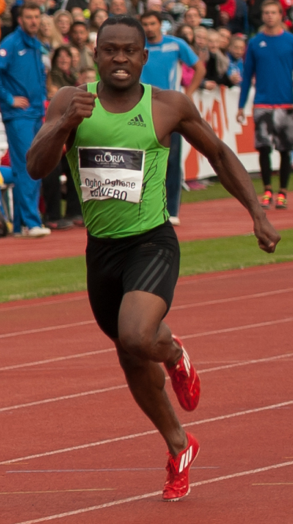 Salzburger Leichtathletik Gala am 27. Mai 2015: Winston Barnes